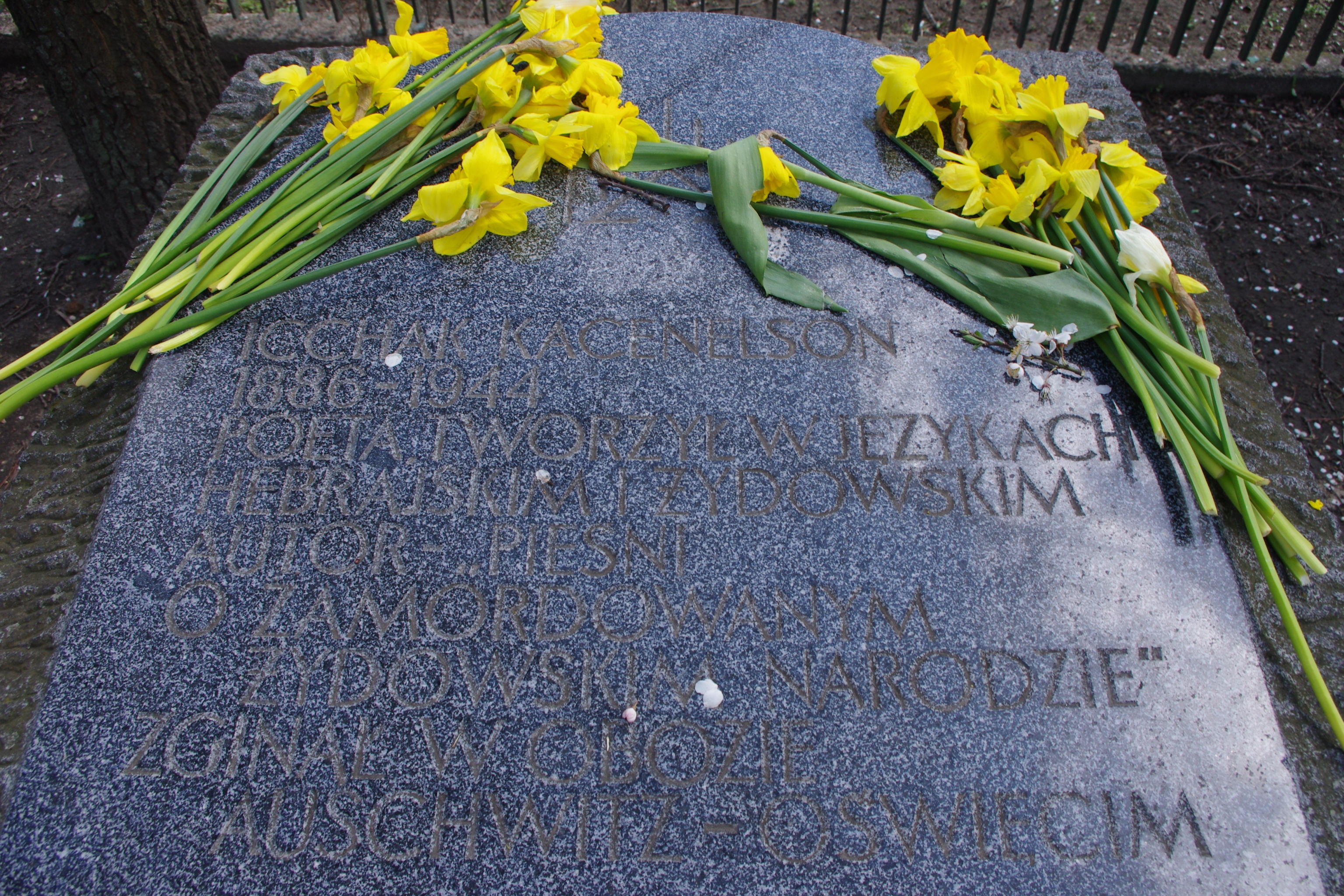 Kamień upamiętniający poetę getta warszawskiego Icchaka Kacenelsona na ul. Stawki w Warszawie